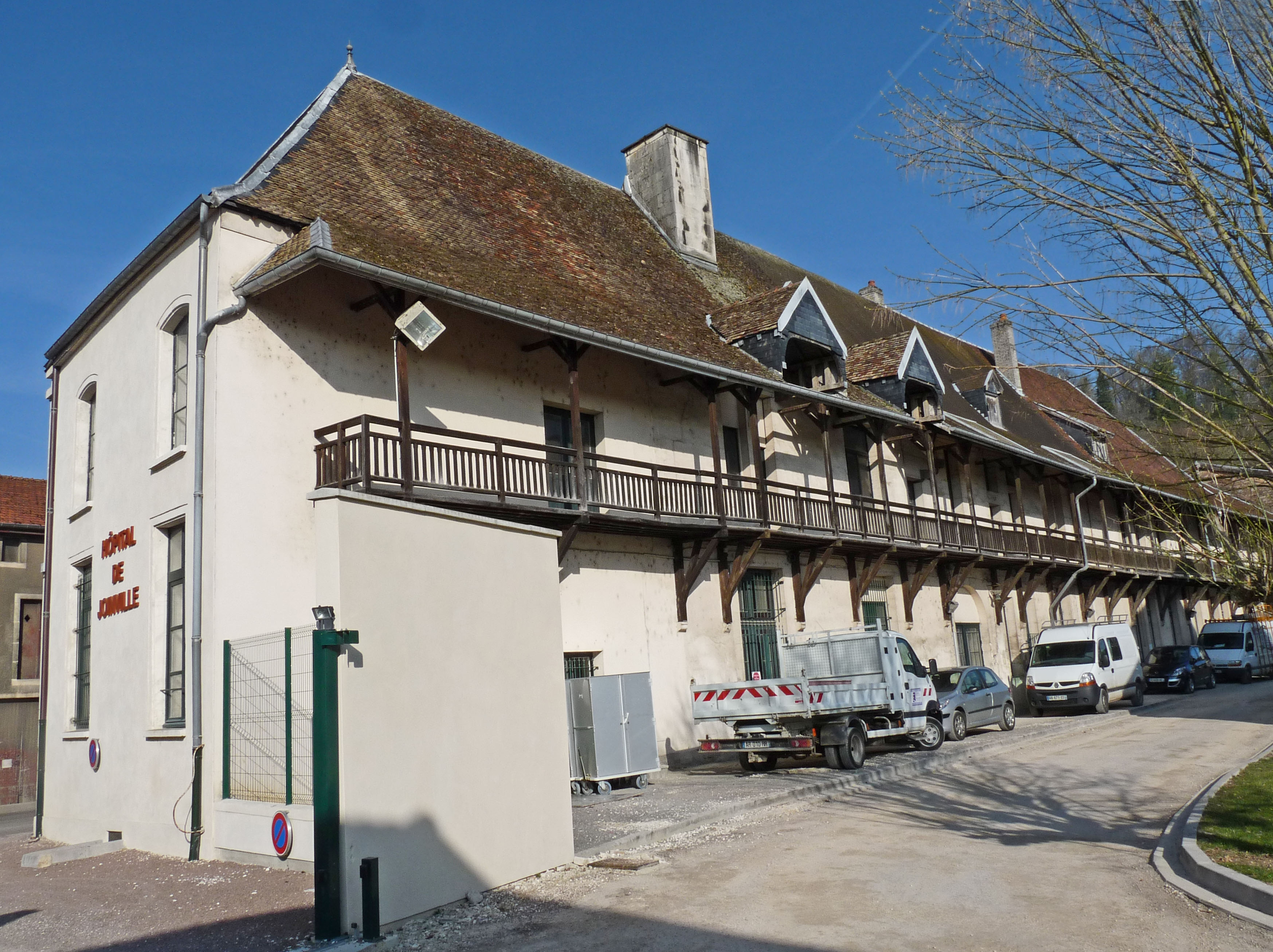 Hôpital Sainte-Croix de Joinville (Haute-Marne).